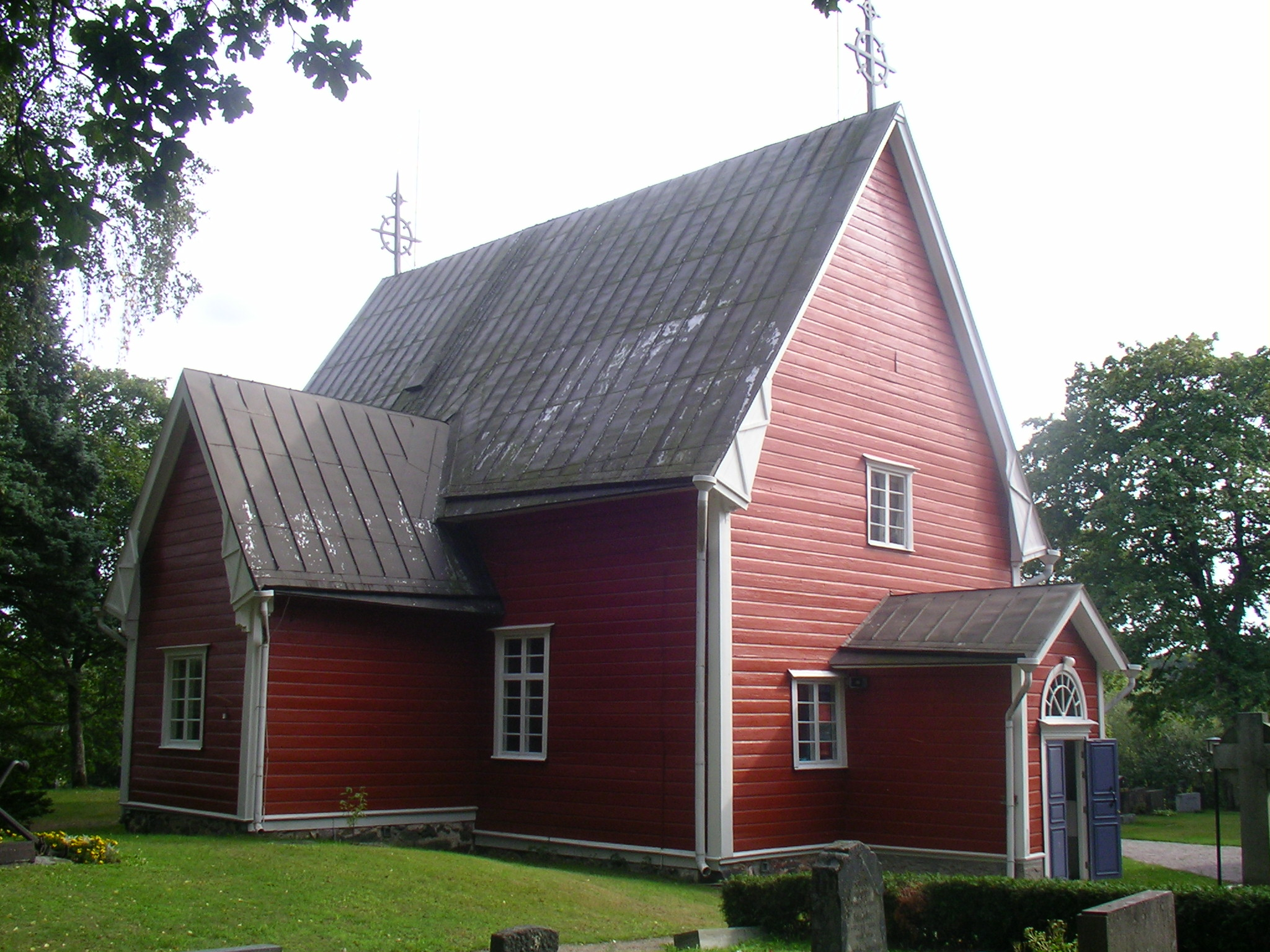 The (luhteran) church in Särkisalo, Finland.